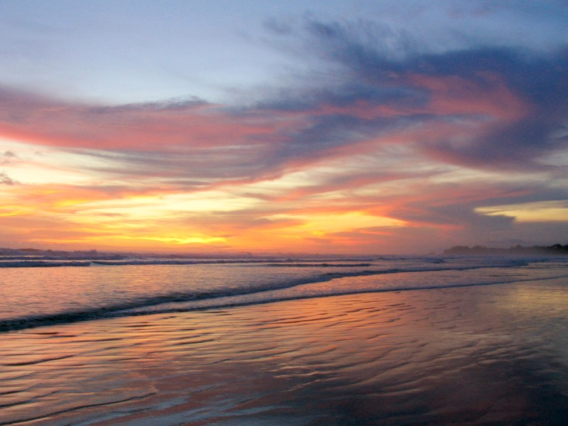 Sunset on Playa Guinones Nosara, Costa Rica